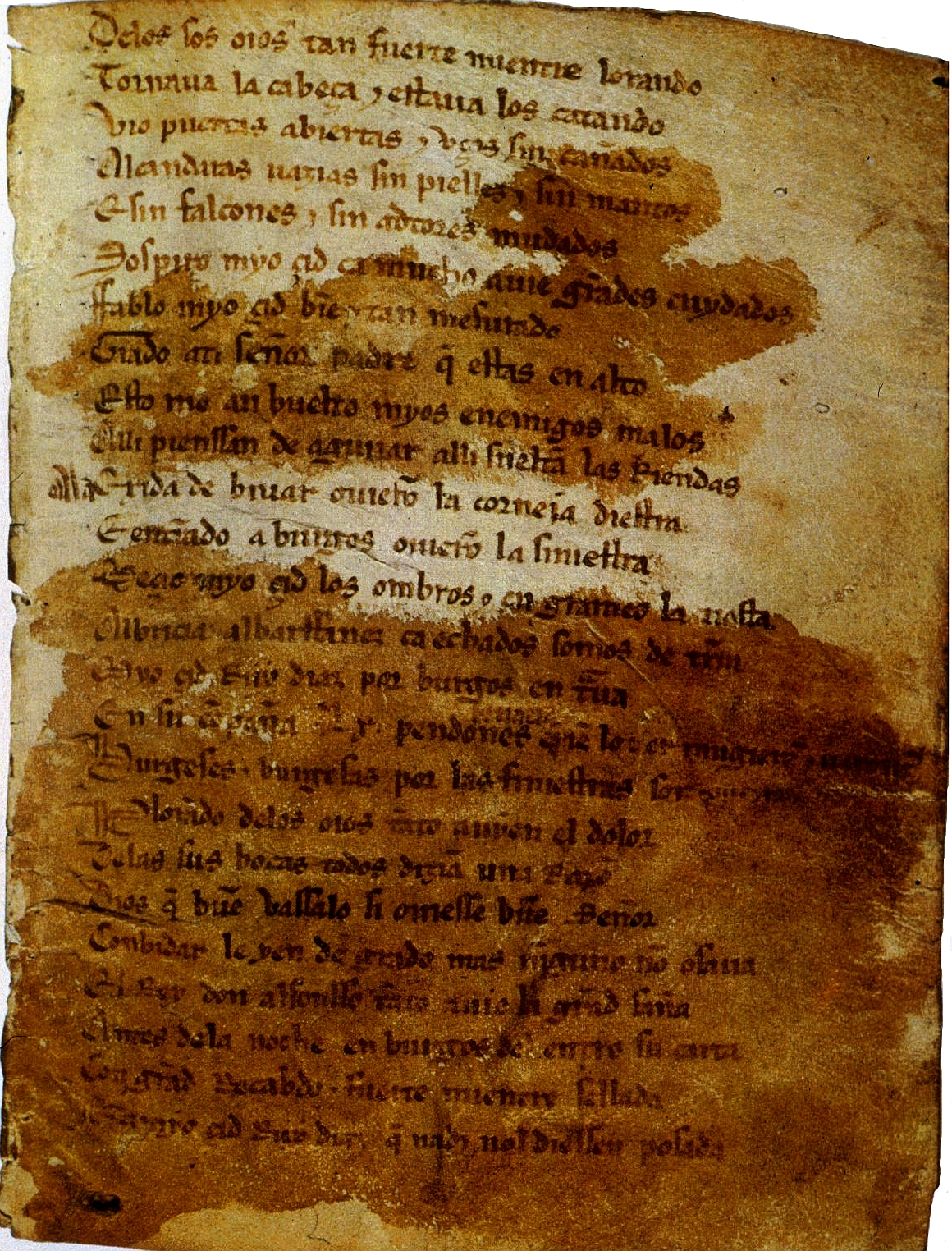 Página inicial del Cantar de mio Cid (f. 1r.º)